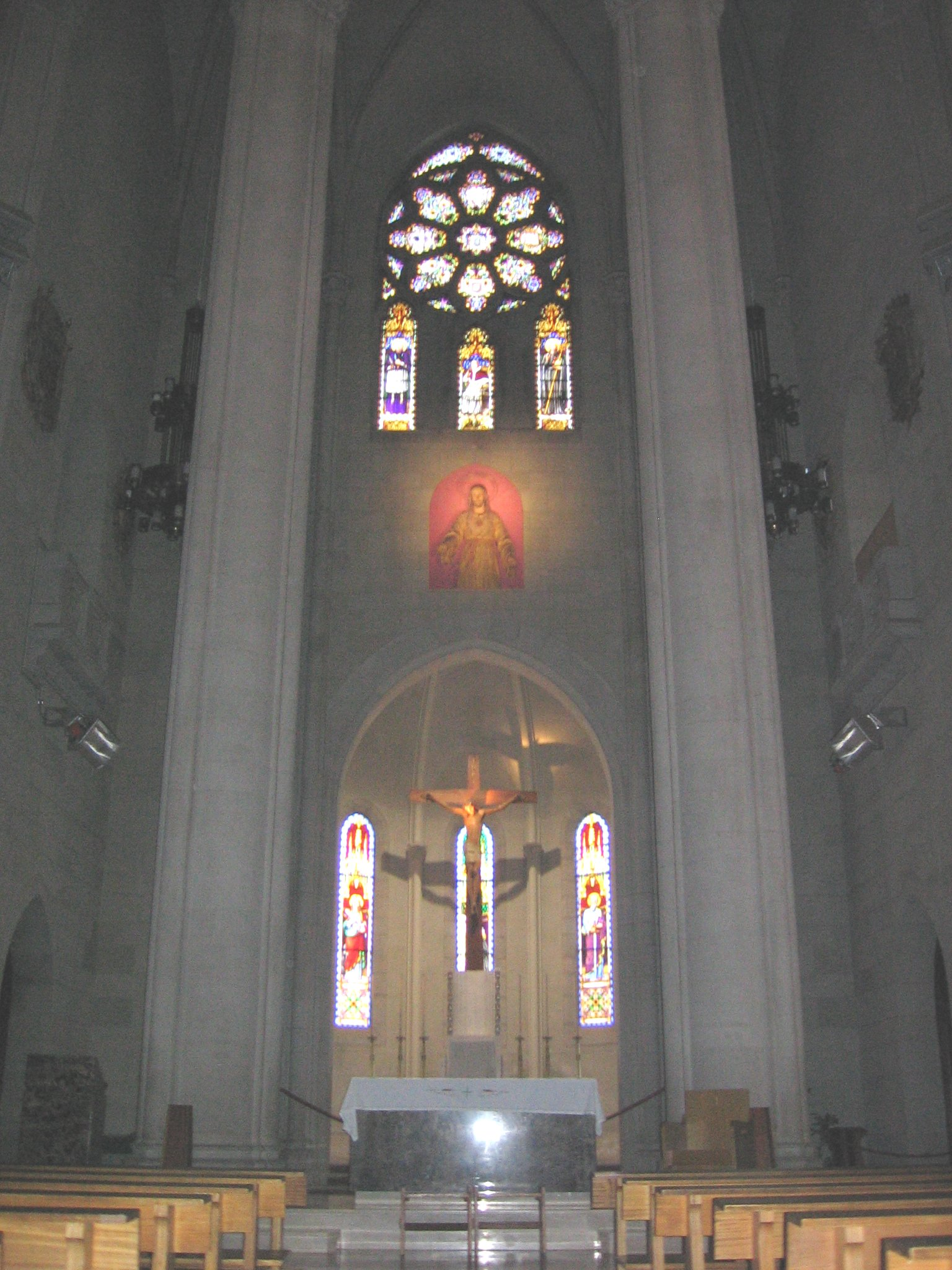 Templo Expiatorio del Sagrado Corazón, interior del templo